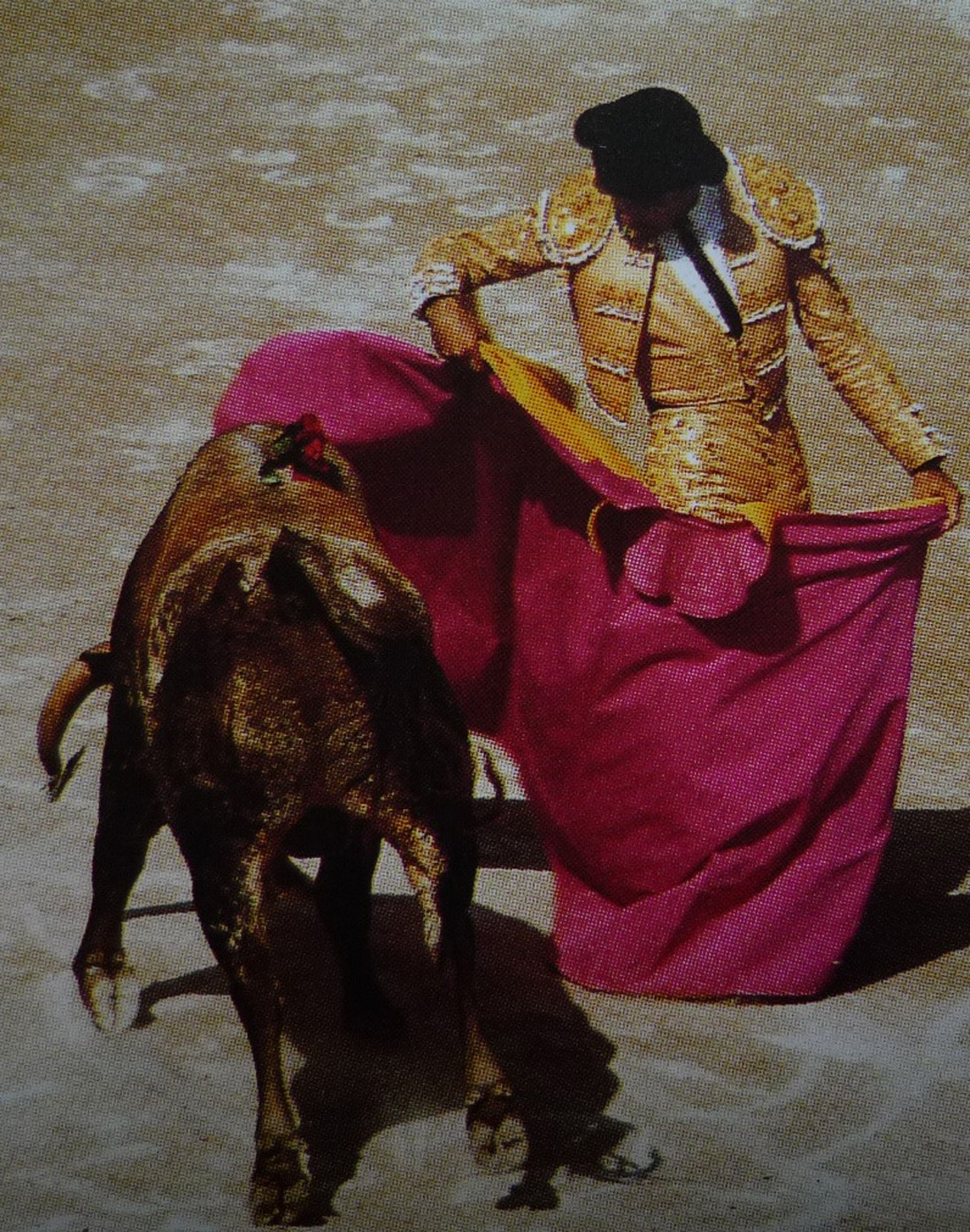 Chicuelina7.JPG